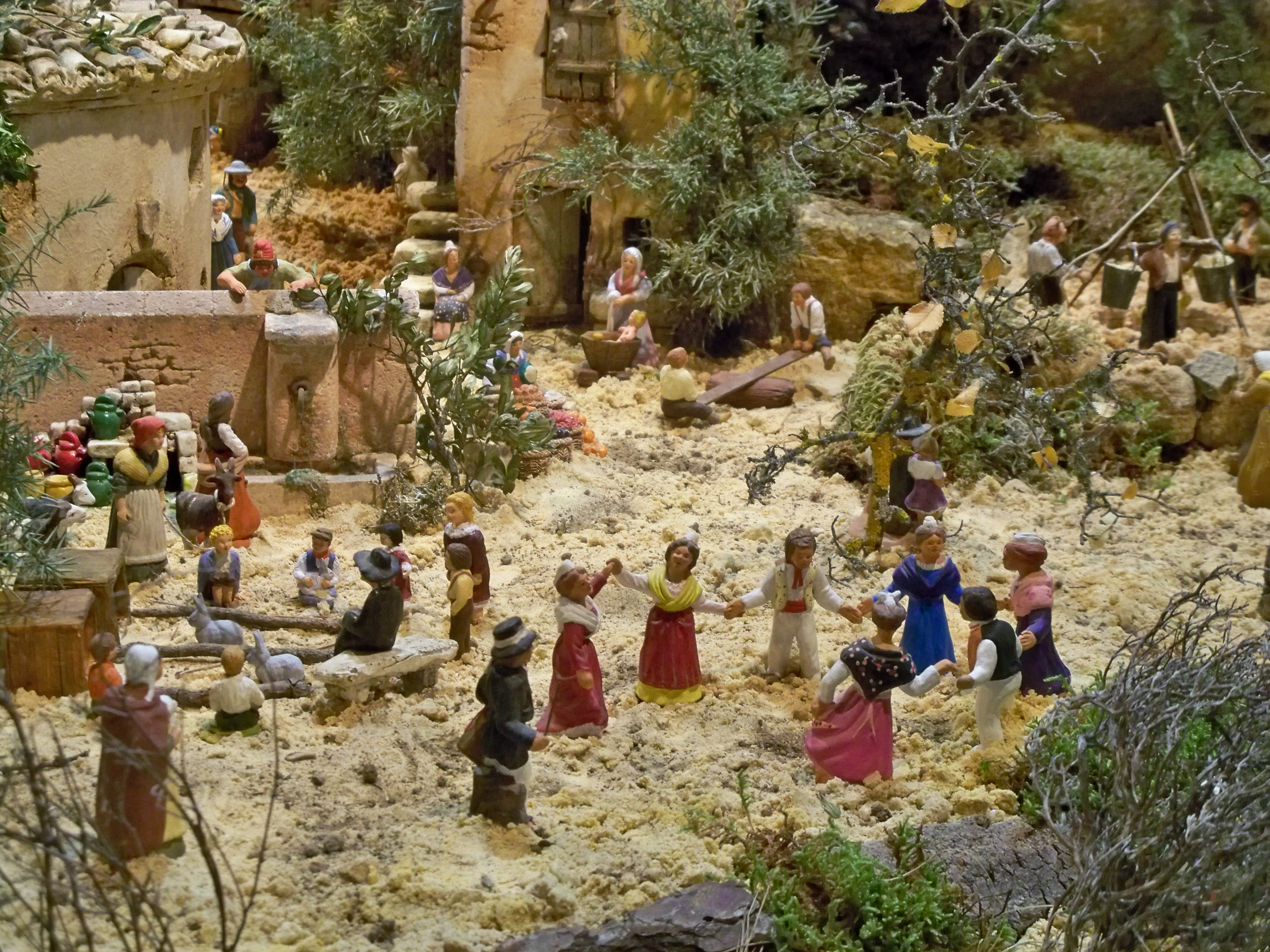 crèche provençale à Carpentras (84)